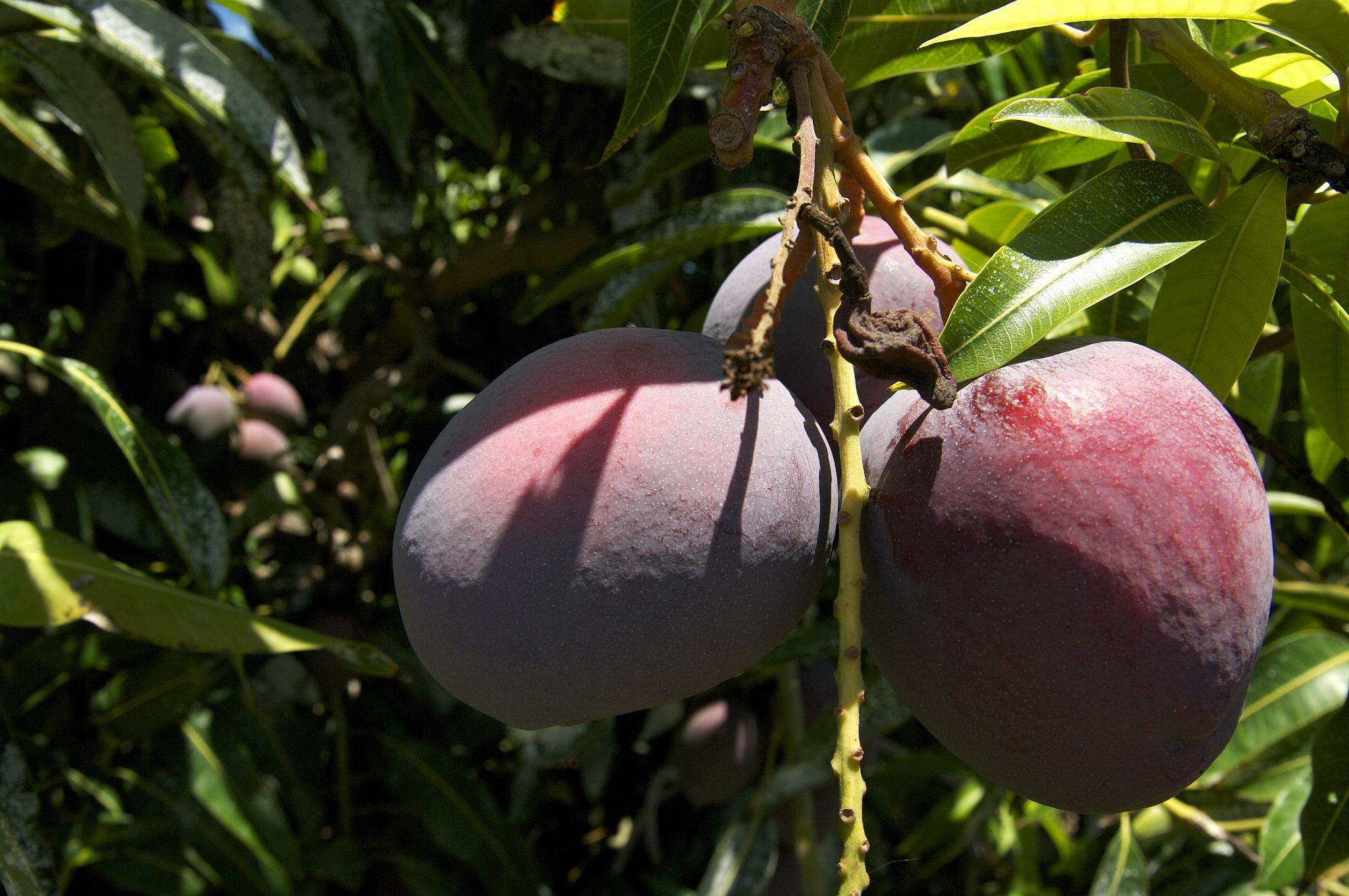 Vale do São Francisco